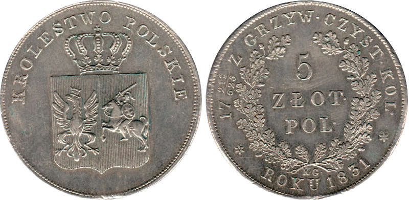 5 zlotych polskich 1831 krolestwo polskie